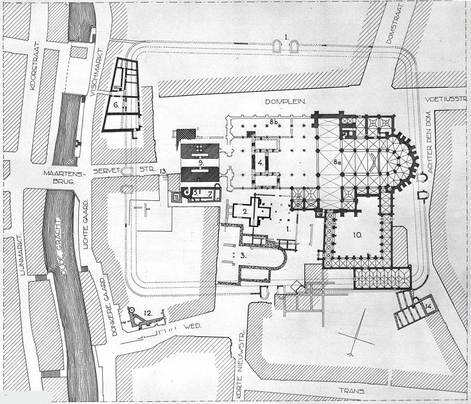 Plattegrond van het Domplein en omgeving in de Nederlandse stad Utrecht. Romeinse en Middeleeuwse bouwwerken zijn aangegeven in de plattegrond. 1 Castellummuren met poorten en principia (in periode 5) 2 Heilige Kruiskapel3 Sint-Salvatorkerk 4 Dom van Adelbold 5 Traptoren 6 Lofen 7/11/13 Bisschopshof 8a/b Domkerk 9 Domtoren 10 Pandhof Dom 12 Mogelijk restant bisschopstoren 14 Claustraal huis (Achter de Dom 7)